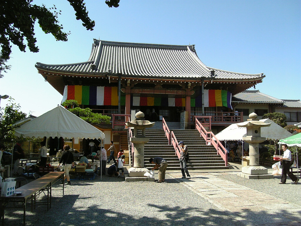 萱振御坊 恵光寺（大阪府八尾市）